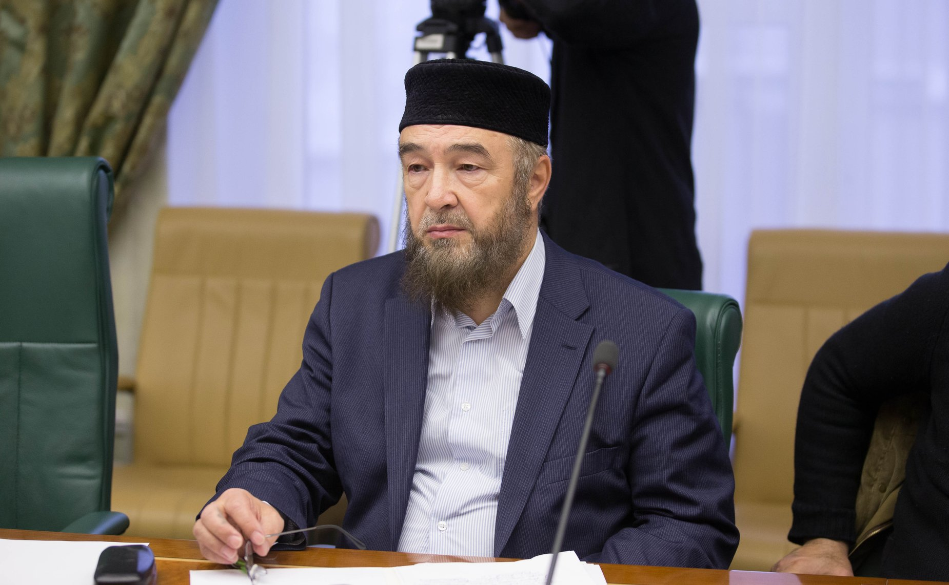 Аширов